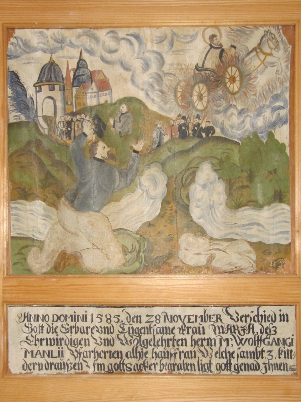 Himmelfahrt des Elia